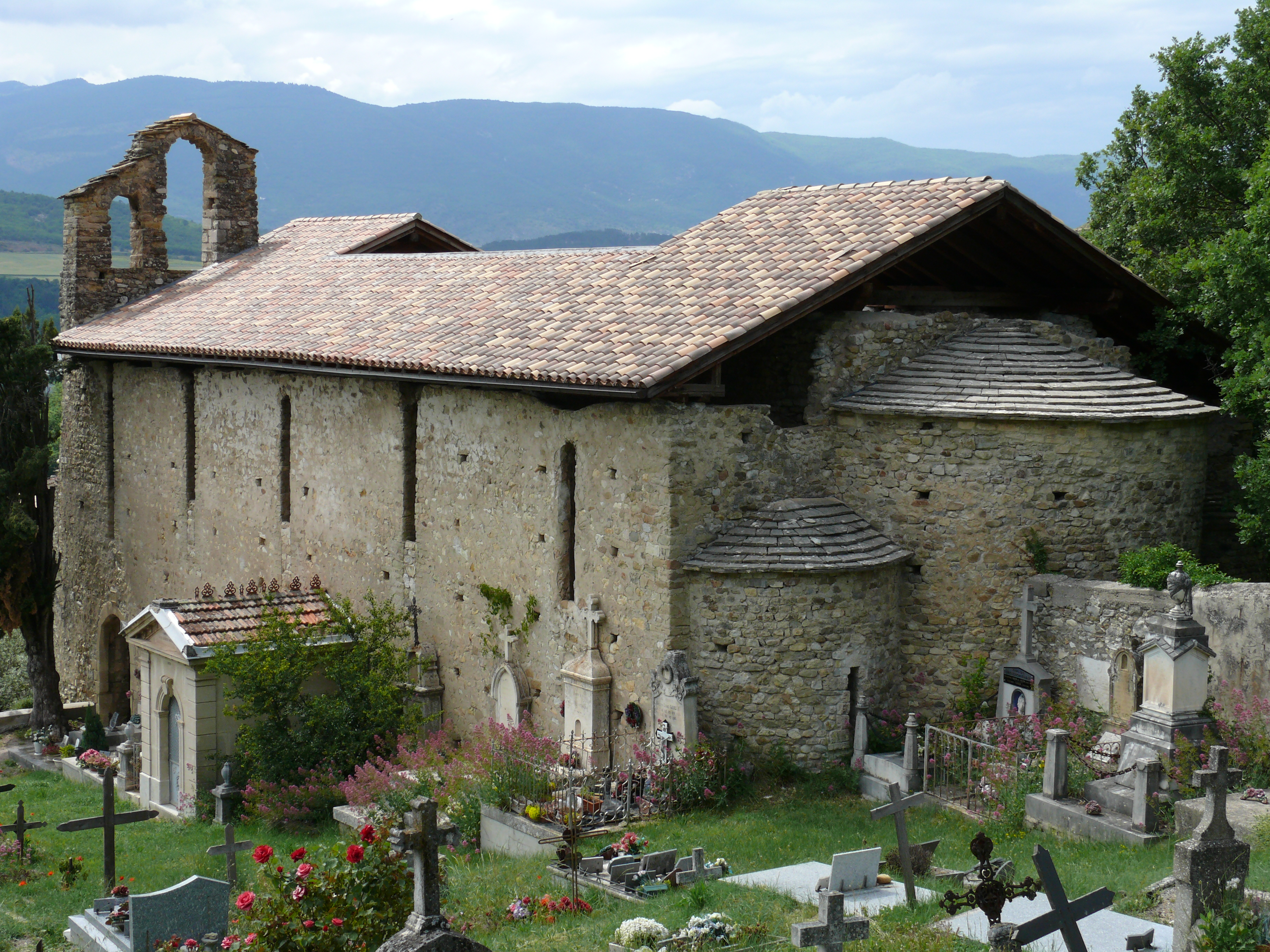 Volonne - Eglise Saint-Martin